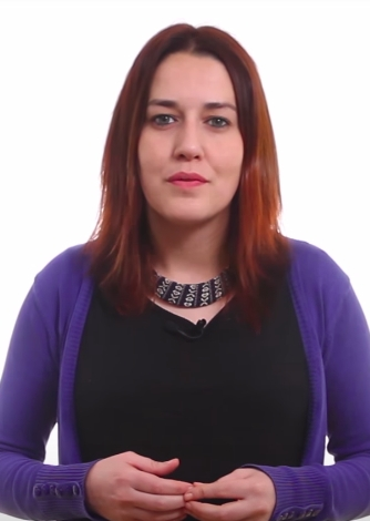 En este vídeo, nuestra diputada, Ana Marcello nos habla de la situación de precariedad que viven las trabajadoras del Servicio de Ayuda a Domicilio, que atienden a más de 500.000 personas en situación de dependencia.